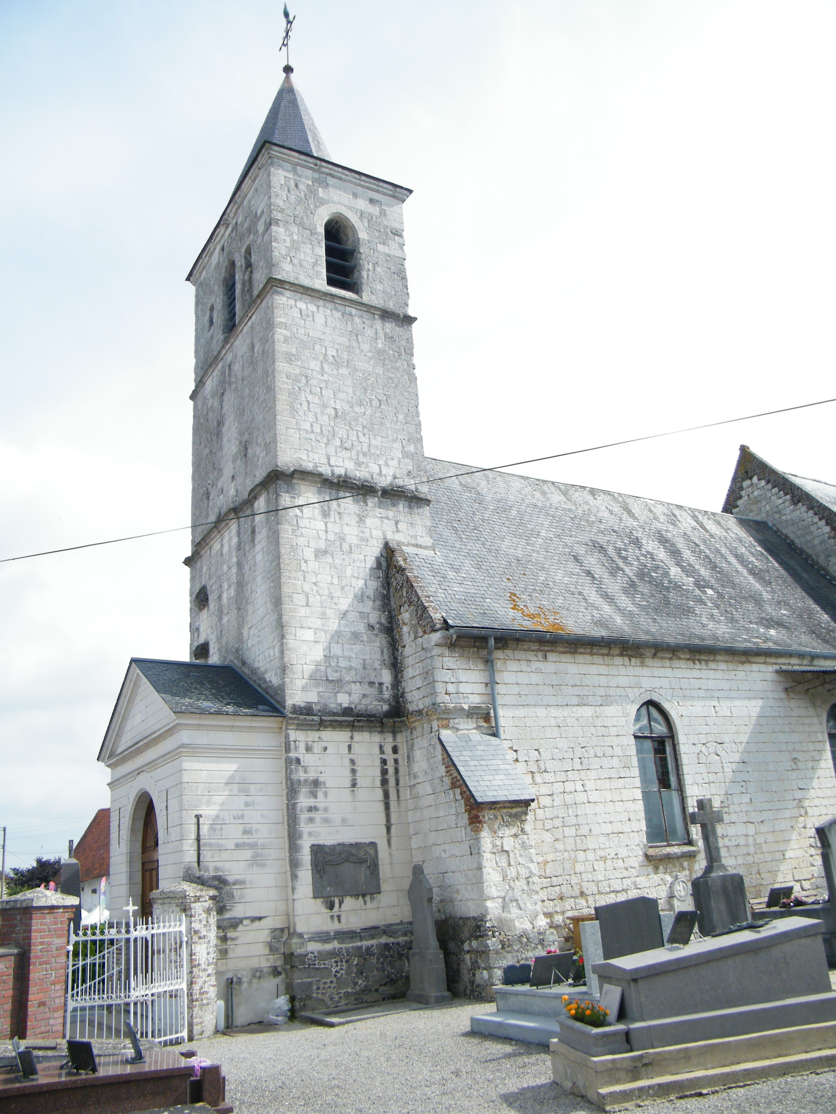 Gouy-Saint-André, Pas-de-Calais, Fr, église (5)